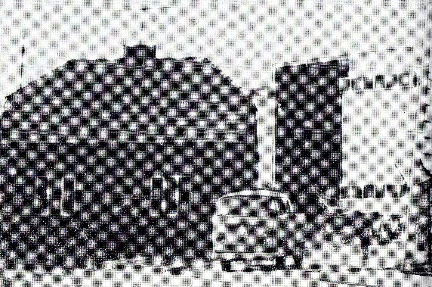 Koło, 1978r. Budowa Zakładów Mięsnych.